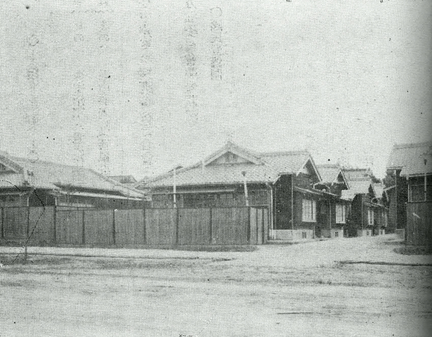 中文（台灣）: 臺中州軍人遺族住宅位於臺中市新高町，於1939年3月完工，設有本館1棟、住宅6棟12戶。